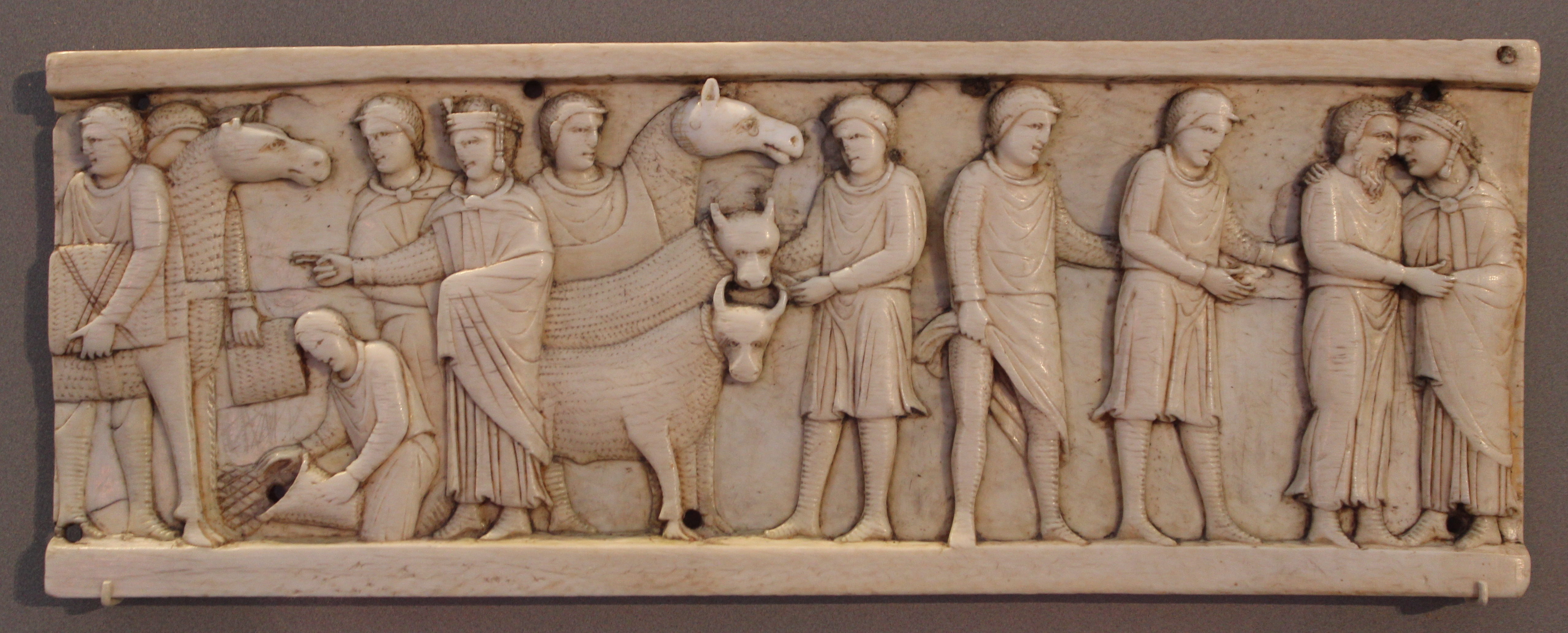 Berlín, Bode-Museum, marfil bizantino con escenas de la vida de José. Constantinopla s. XII.